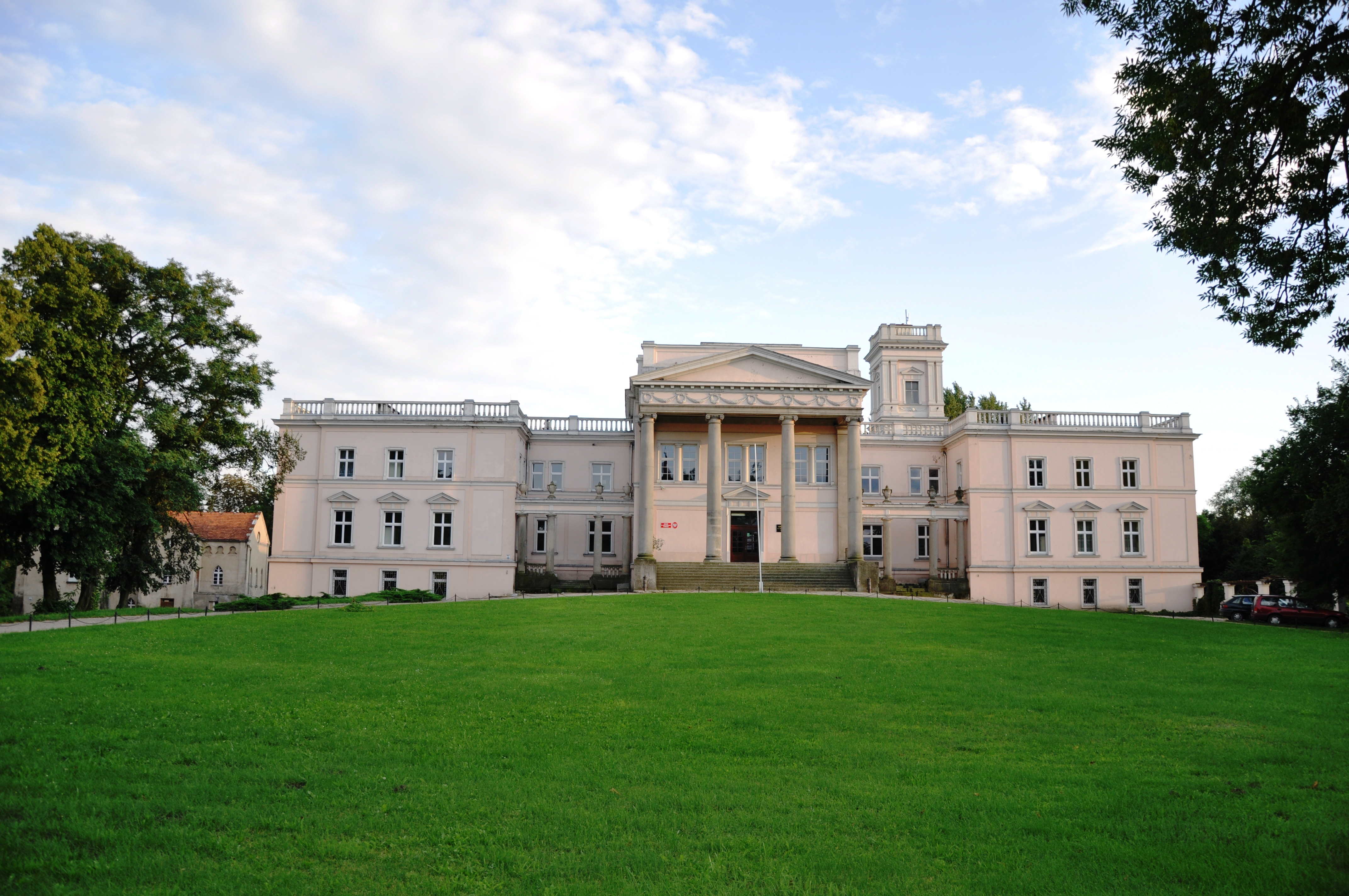 Miloslaw